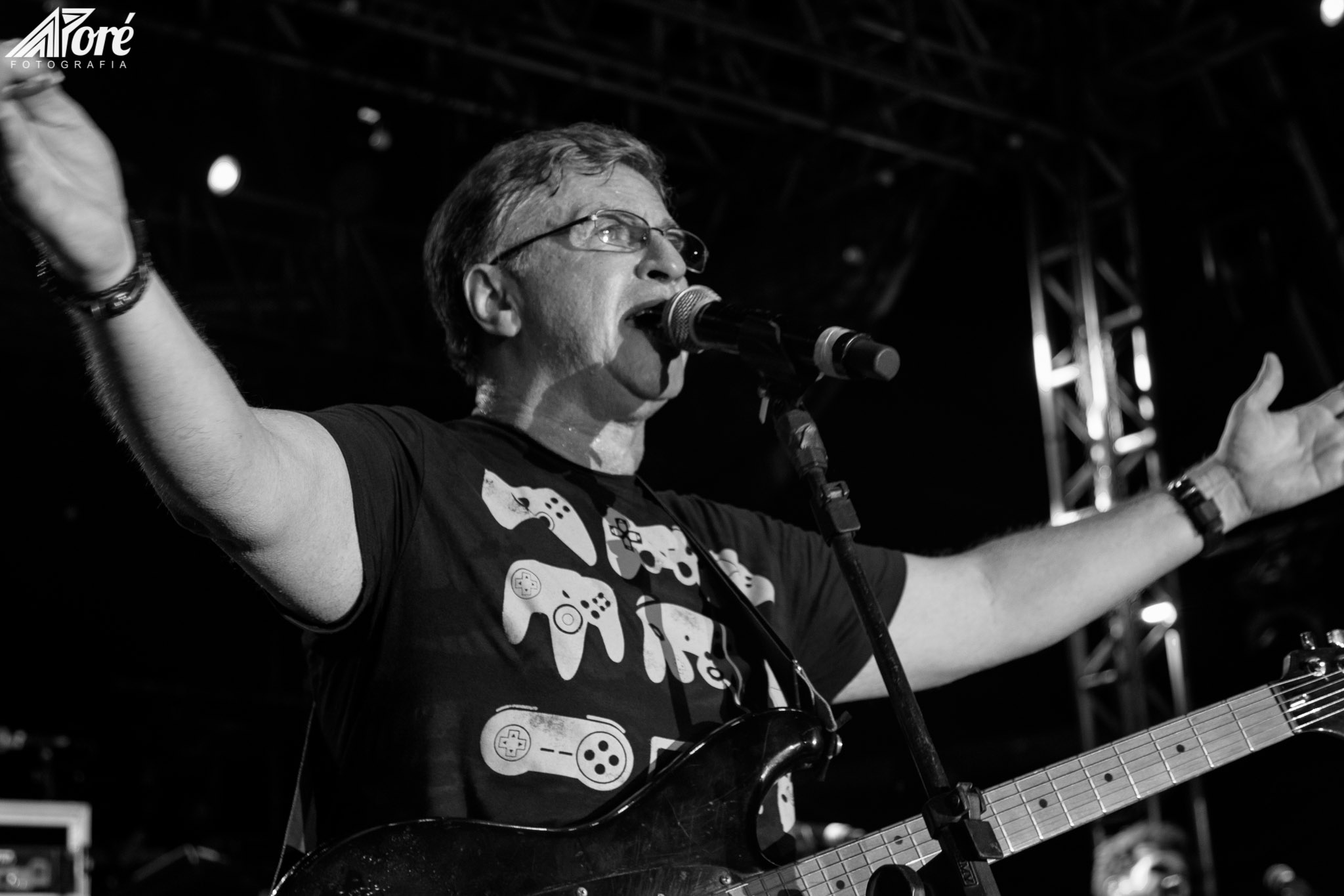 Marcos Sabino ao vivo. circa.2016